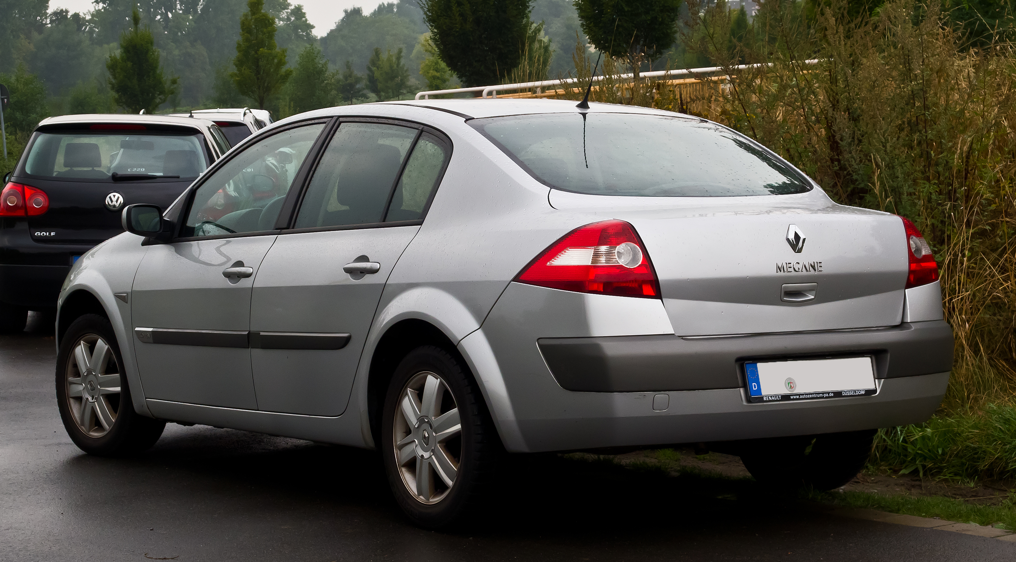 Renault Mégane Stufenheck 1.6 16V (II)